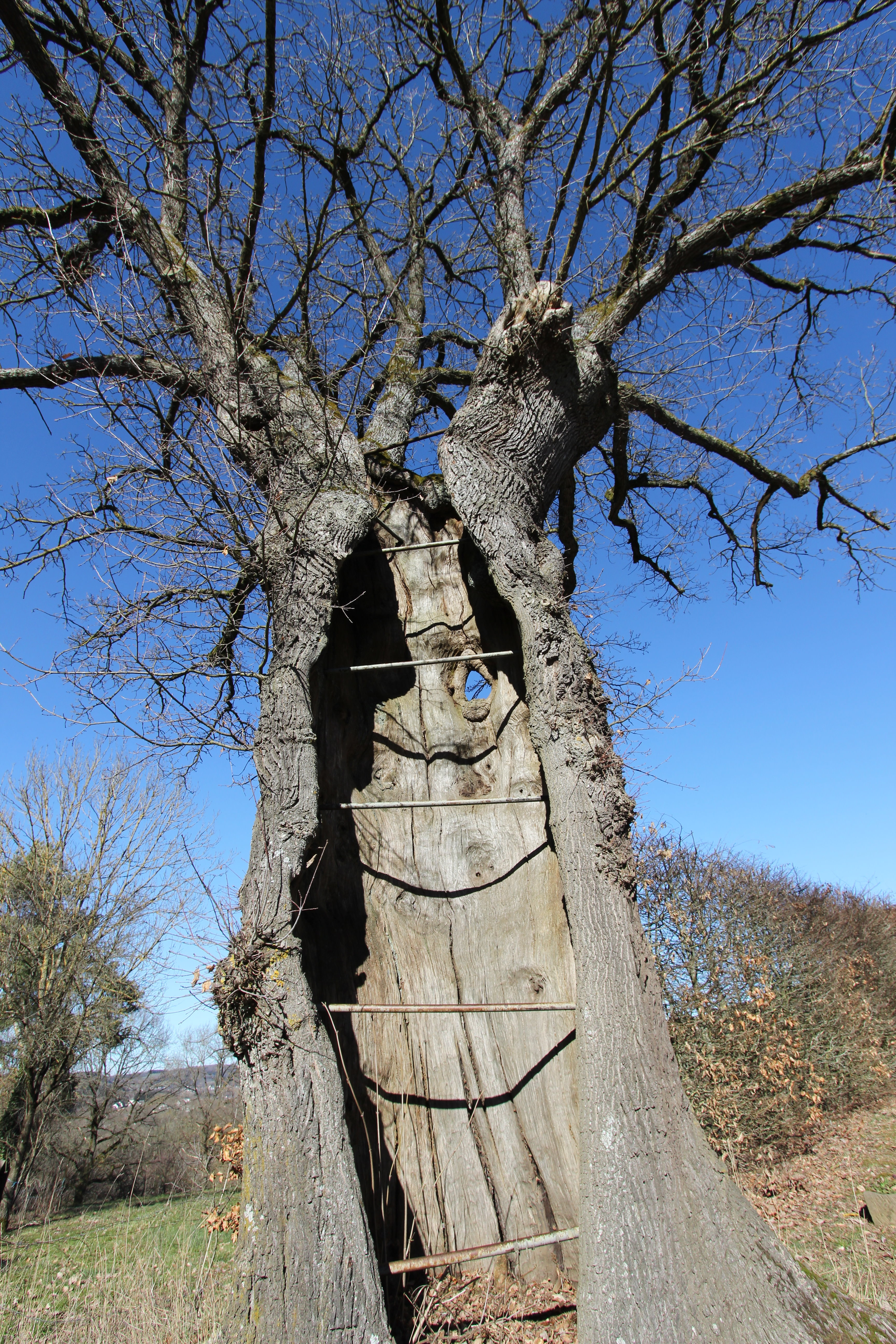 Merlscheid, bei Dorfstraße 7. Quercus species, um 1650 gekeimt; 18 m hoch bei 4,4 m Brusthöhenumfang und 18 m Kronendurchmesser. Aufnahme von 2019.